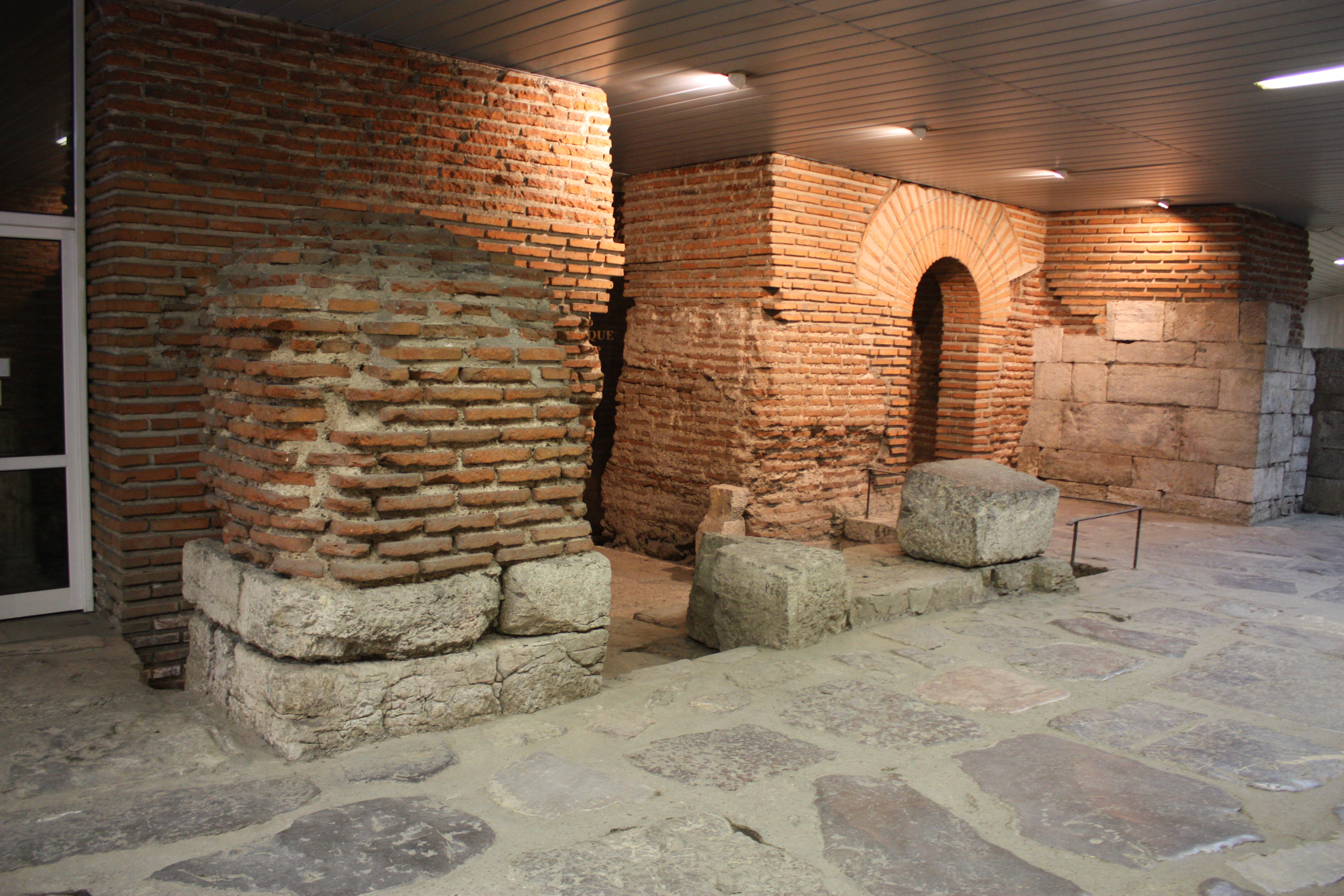 95 Serdica Fortress, Sofia, Bulgaria, Festung Sercica, Сердика